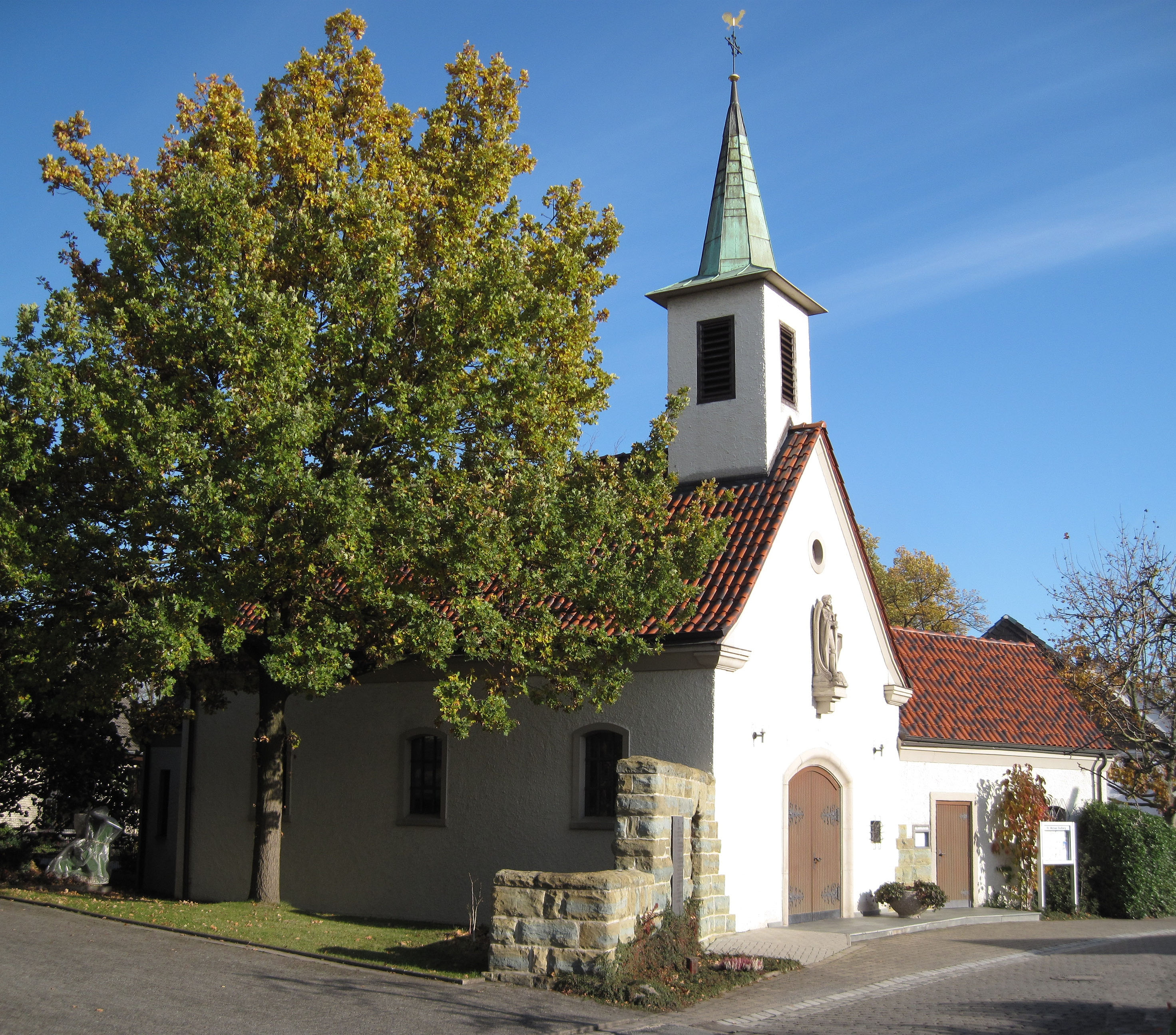 Werl, Budberg, St. Michael Gesamtansicht